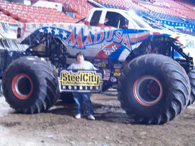 Un fan posant devant le Monster truck Madusa piloté par la catcheuse américaine Debra Miceli.